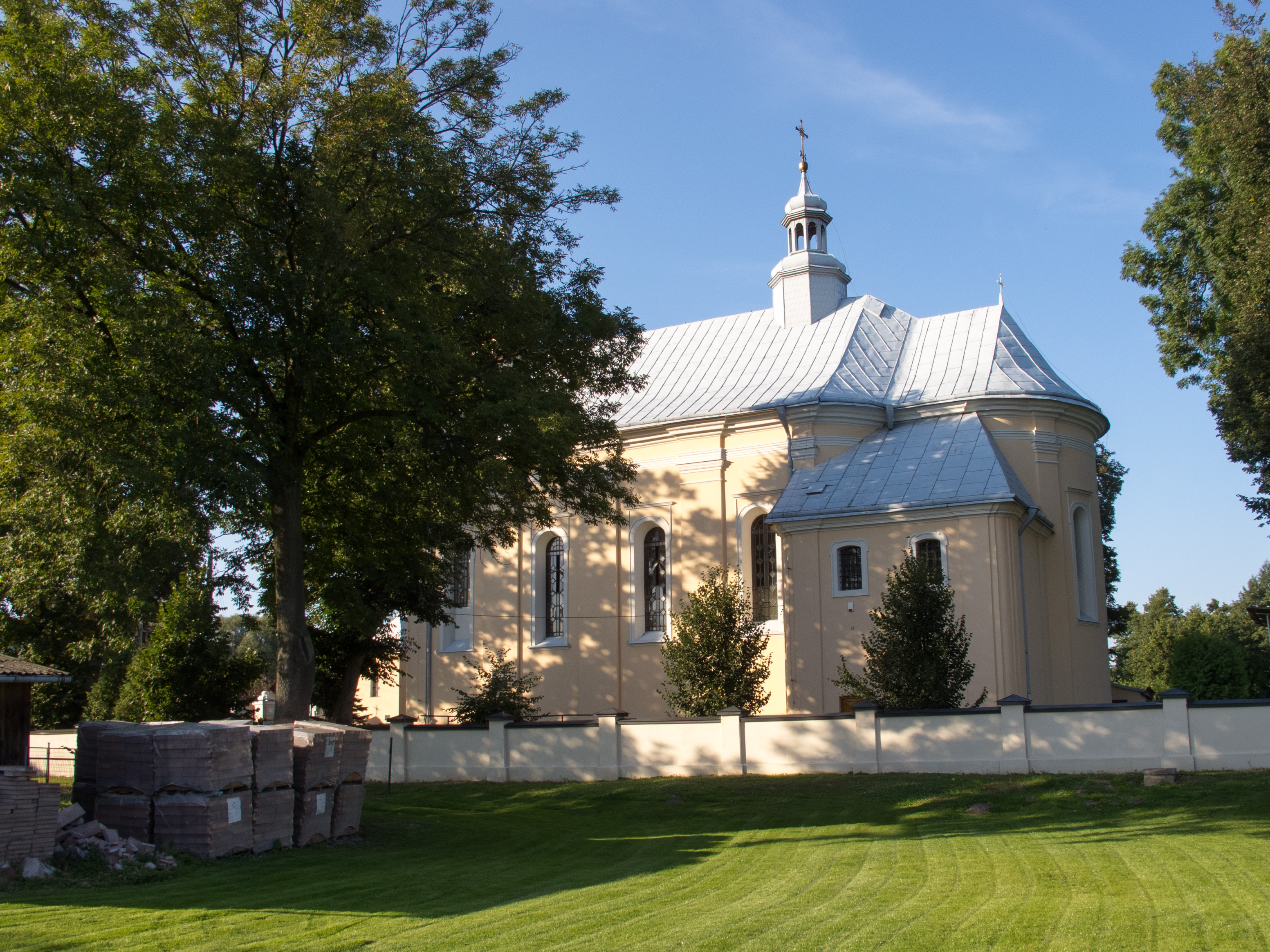 Puchaczów - zespół kościoła par. p.w. Wniebowzięcia NMP, 1778-1800